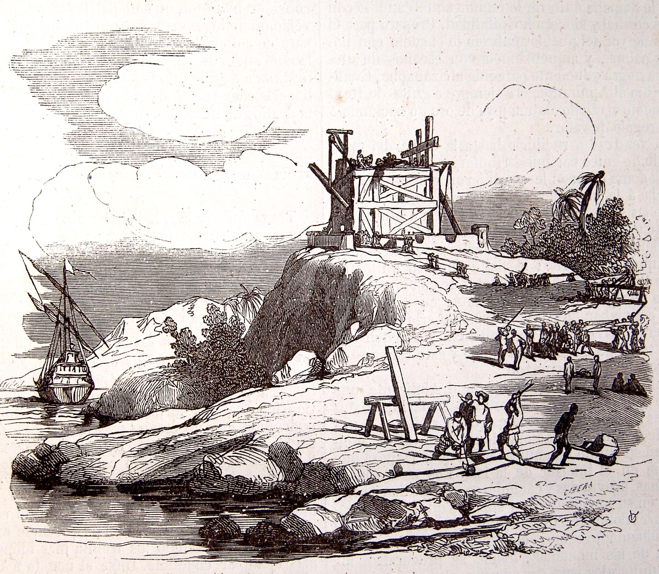 Construcción de la fortaleza de La Navidad